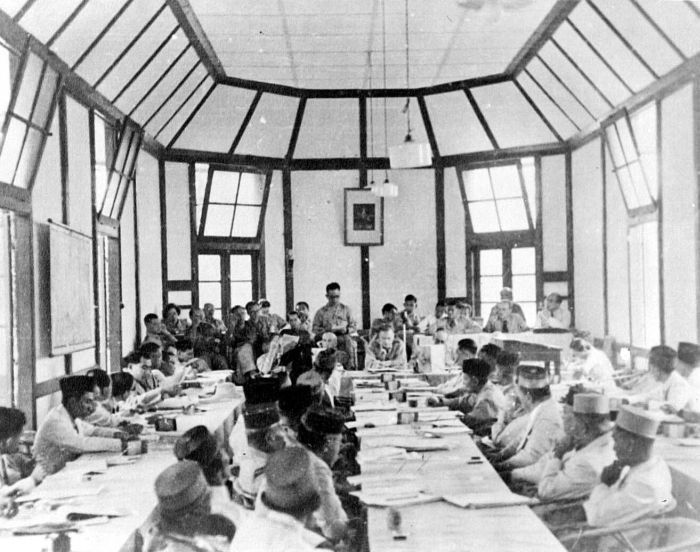 Repronégatif. La conférence réunissant à Malino, dans le sud de Célèbes, 39 représentants de Bornéo, du "Grand Est" indonésien et des Pays-Bas, sous la direction de Van Mook, pour la formation d'une Indonésie fédérale